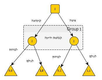 תורת המשחקים - משחק שני שחקנים עם ידיעה לא שלמה